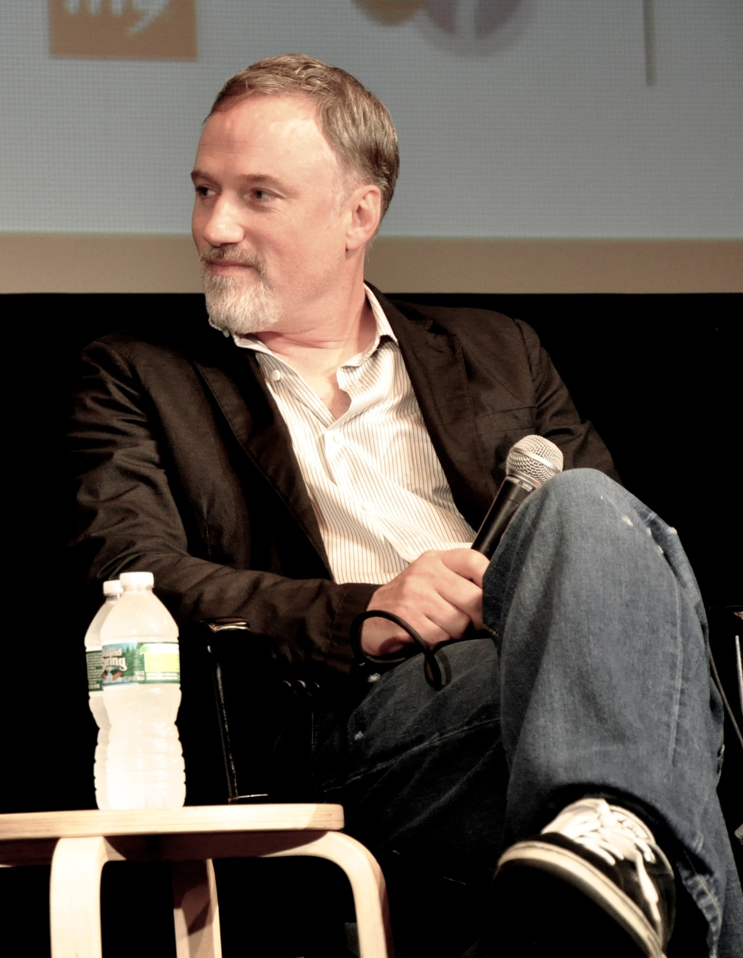 El actor Jesse Eisenberg junto al director de cine David Fincher en el estreno de The social network en el Festival de Cine de Nueva York. 24 de septiembre de 2010.